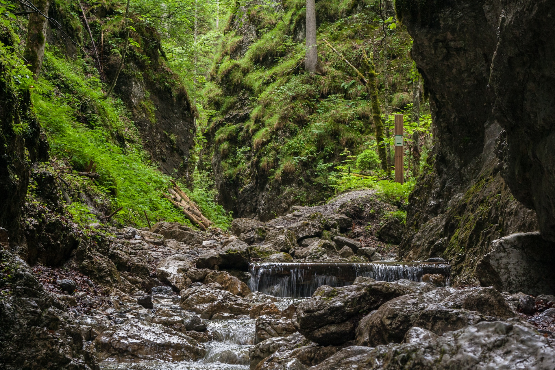 Erlebnisweg Roßlochklamm im Naturpark Mürzer Oberland This media shows the natural monument in Styria with the ID 251648.